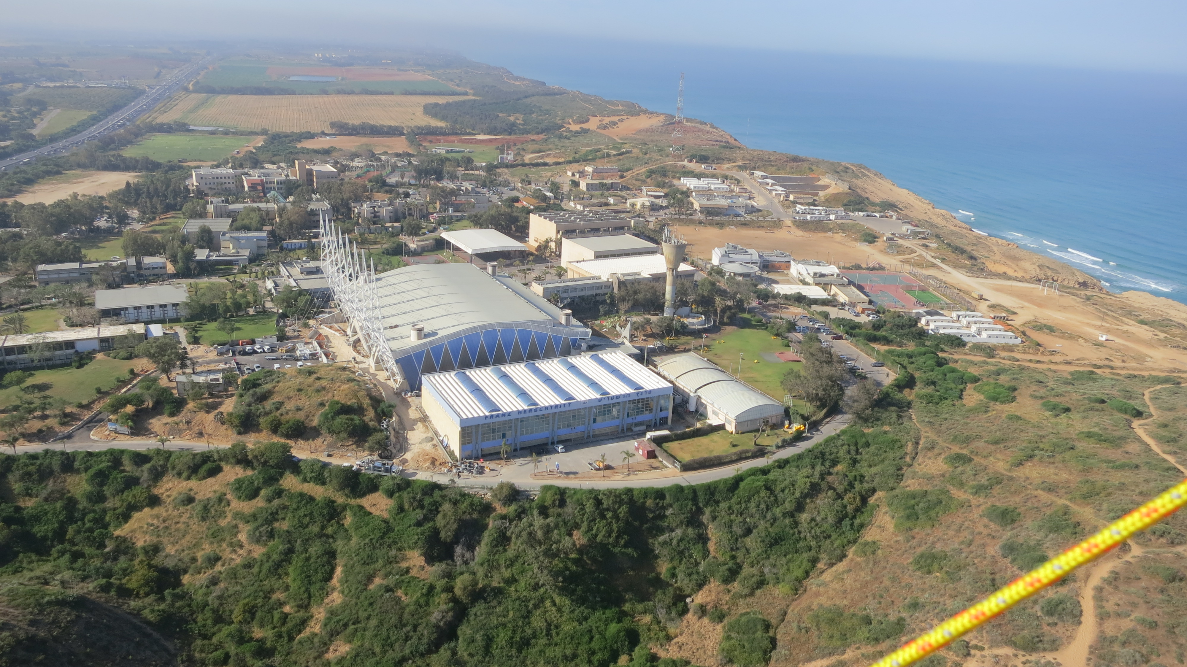 מכון וינגייט תצלום אוויר